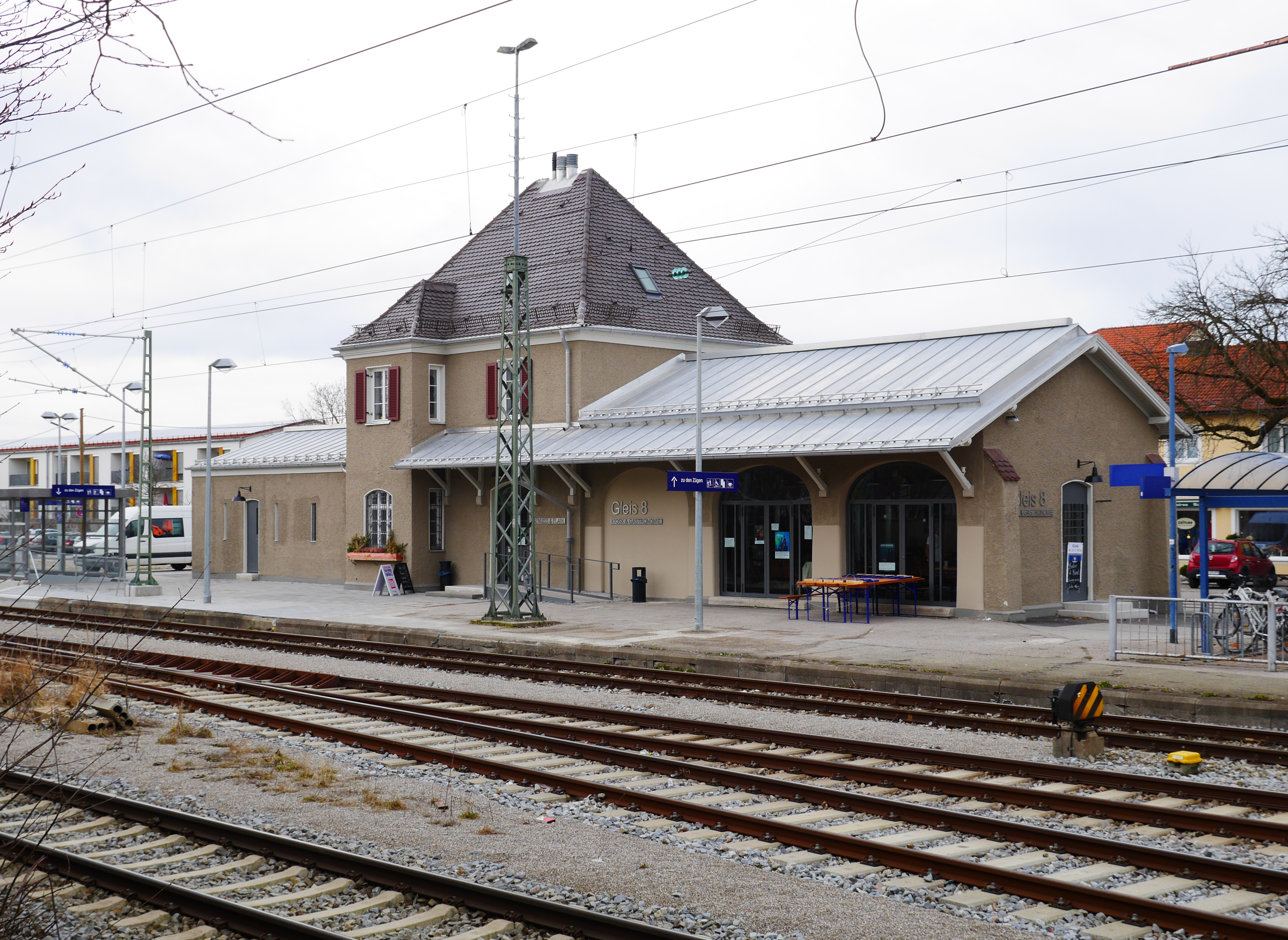 Empfangsgebäude des Bahnhofs Gilching-Argelsried von der Gleisseite, Blick aus Richtung Osten